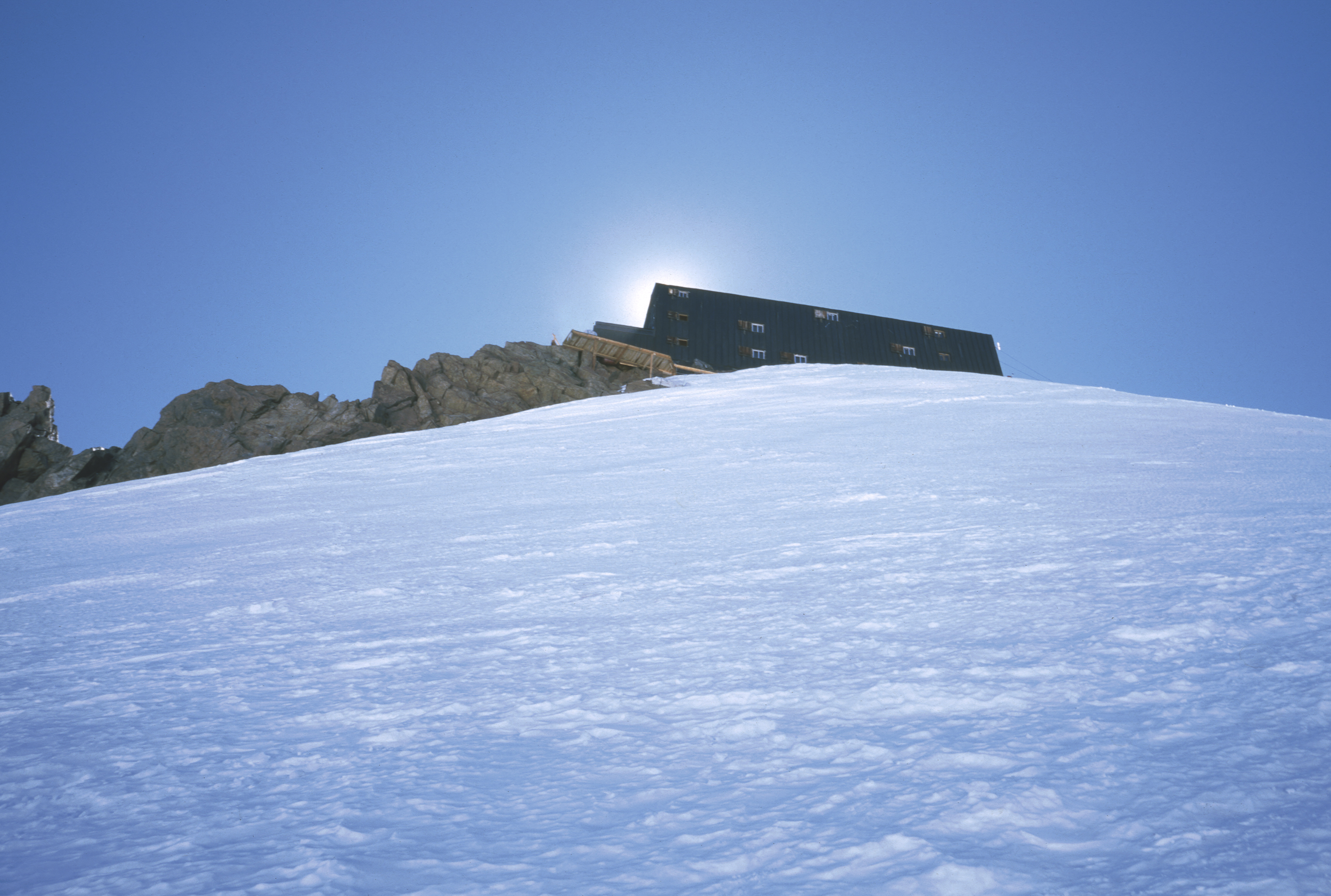 Punta Gnifetti con la capanna Regina Margherita This is a photo of a monument which is part of cultural heritage of Italy.